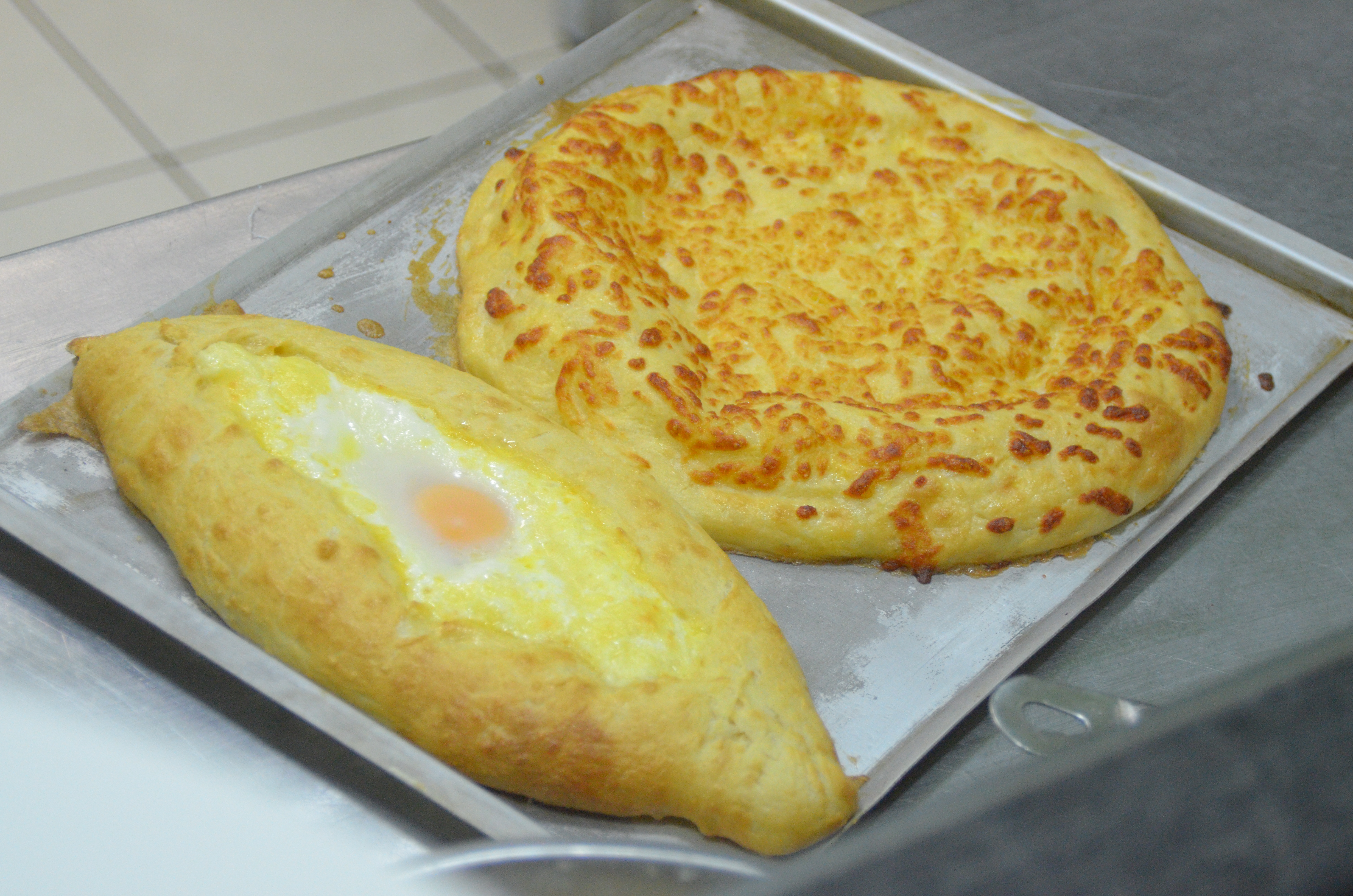 Ресторан «Ньютон» в Донецке.